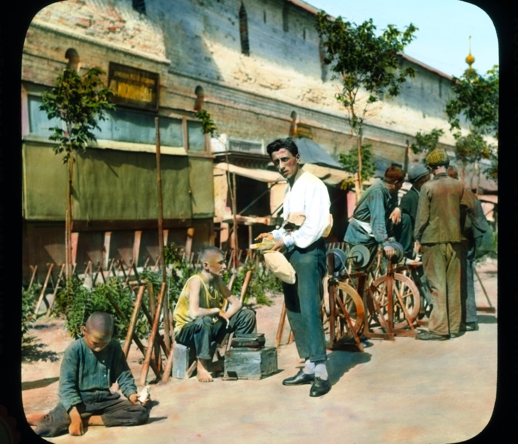 Москва. Китайгородская стена